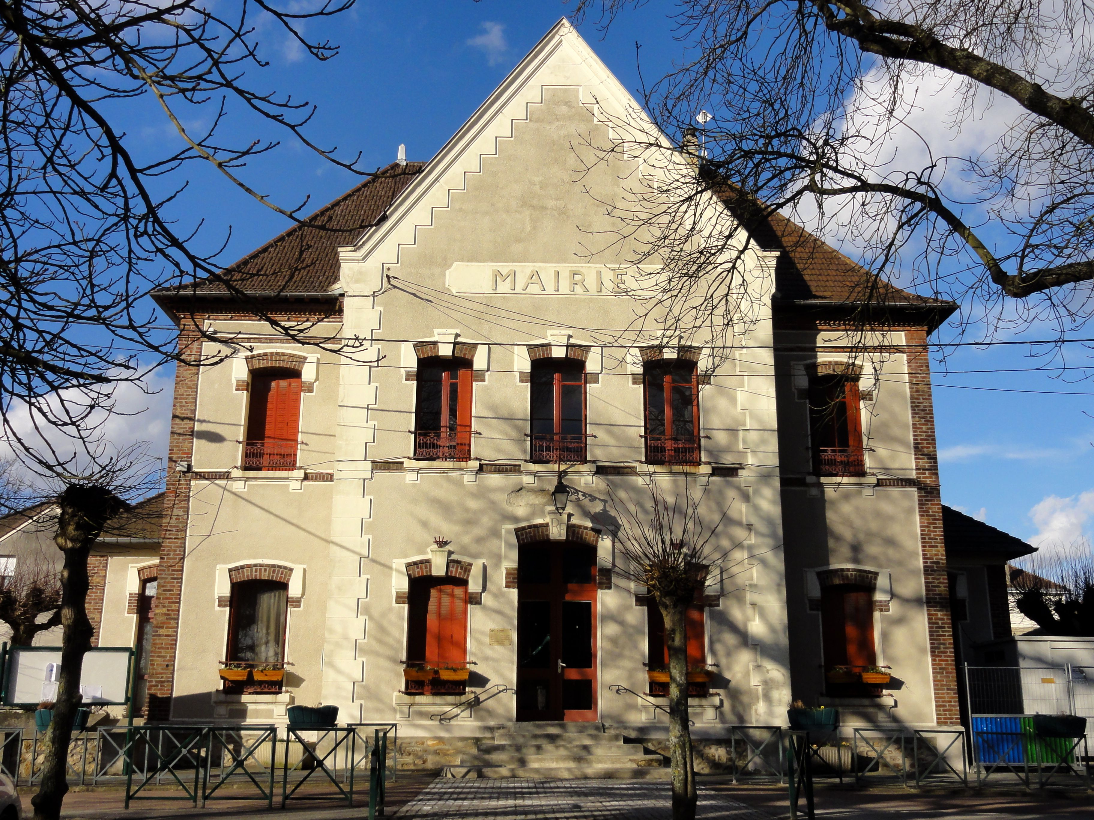 La mairie.